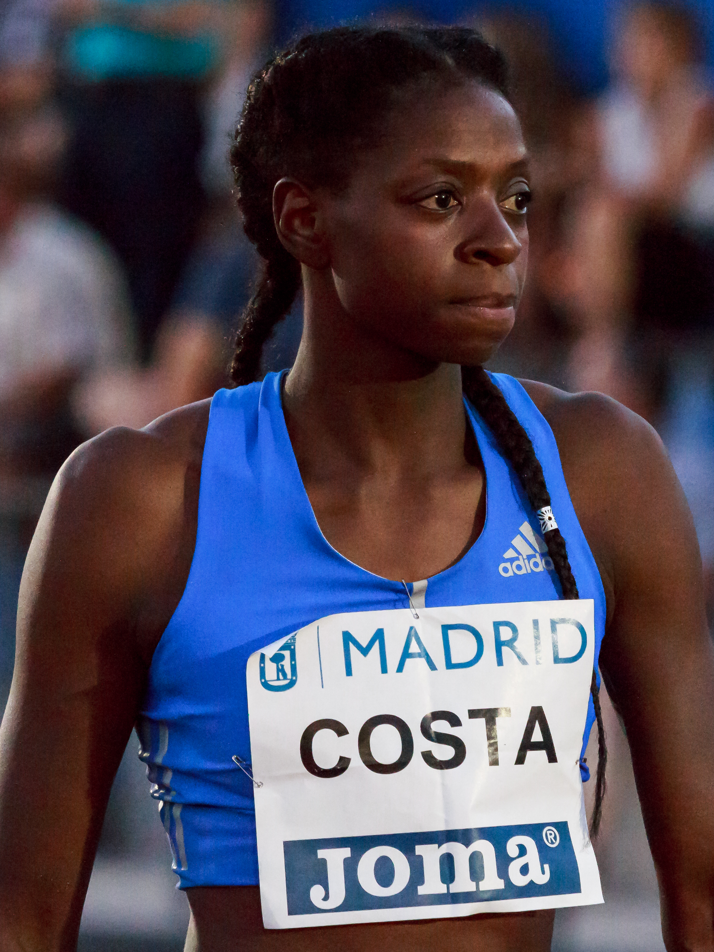 Susana Costa (POR). Triple salto. IAAF World Challenge. Meeting Madrid 2017. Moratalaz, Madrid.